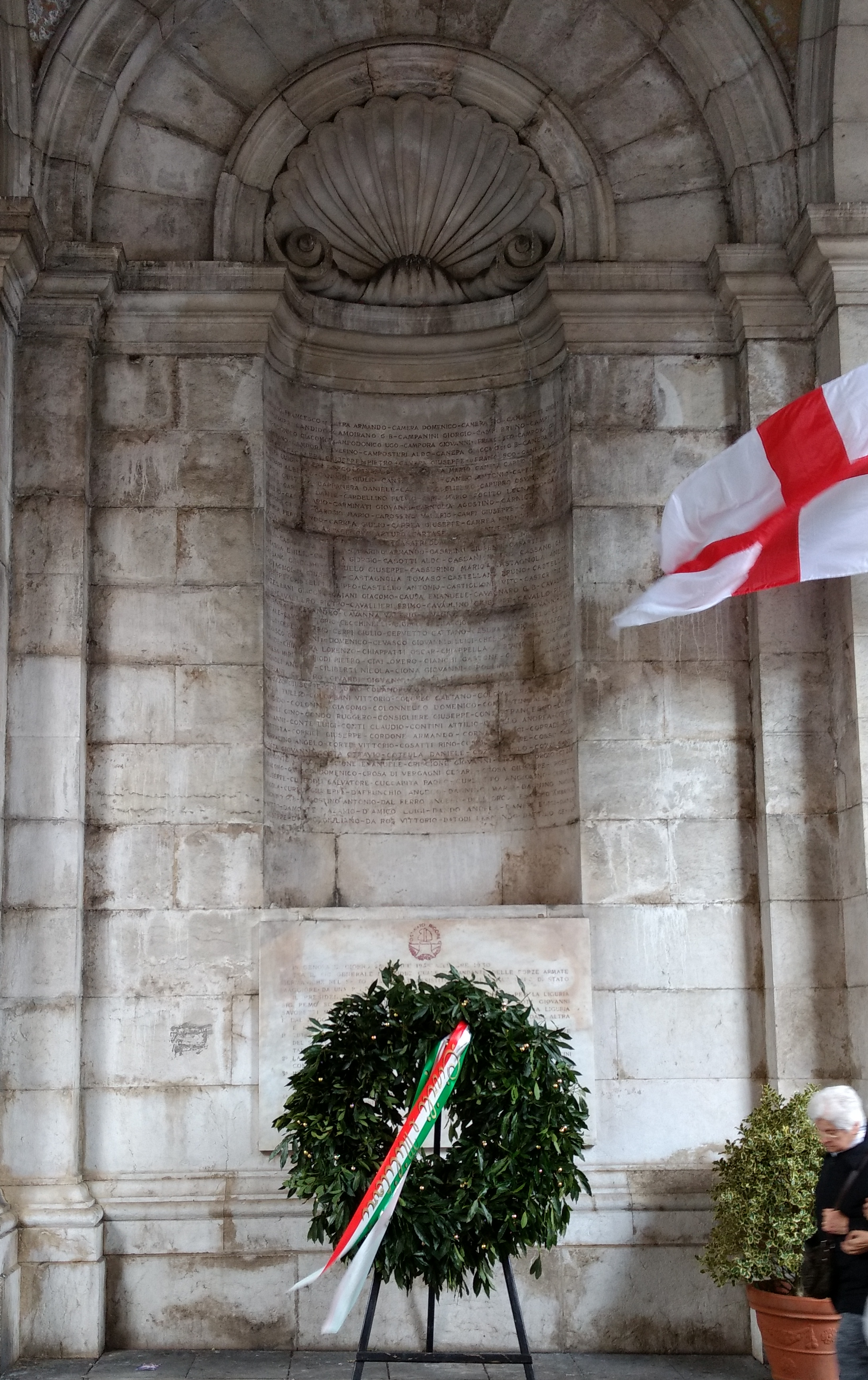 Unter der im späten 19. Jahrhundert errichteten Ponte Monumentale in der Via XX Settembre wurden 1949 die Namen aller bekannten Opfer des ligurischen Befreiungskampfes eingelassen. Die Gedenktafel darunter beschreibt die Kapitulation vom 25.4.45 und zitiert die Kapitulationsbedingungen. Am 25.4. wird insb. in der Villa Migone und hier der Opfer von Nationalsozialismus und Faschismus sowie des Tags der Befreiung gedacht.